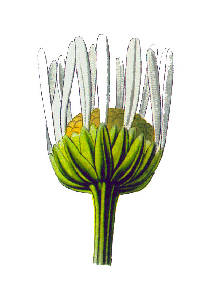 Matricaria recutita - Dettaglio dell'involucro